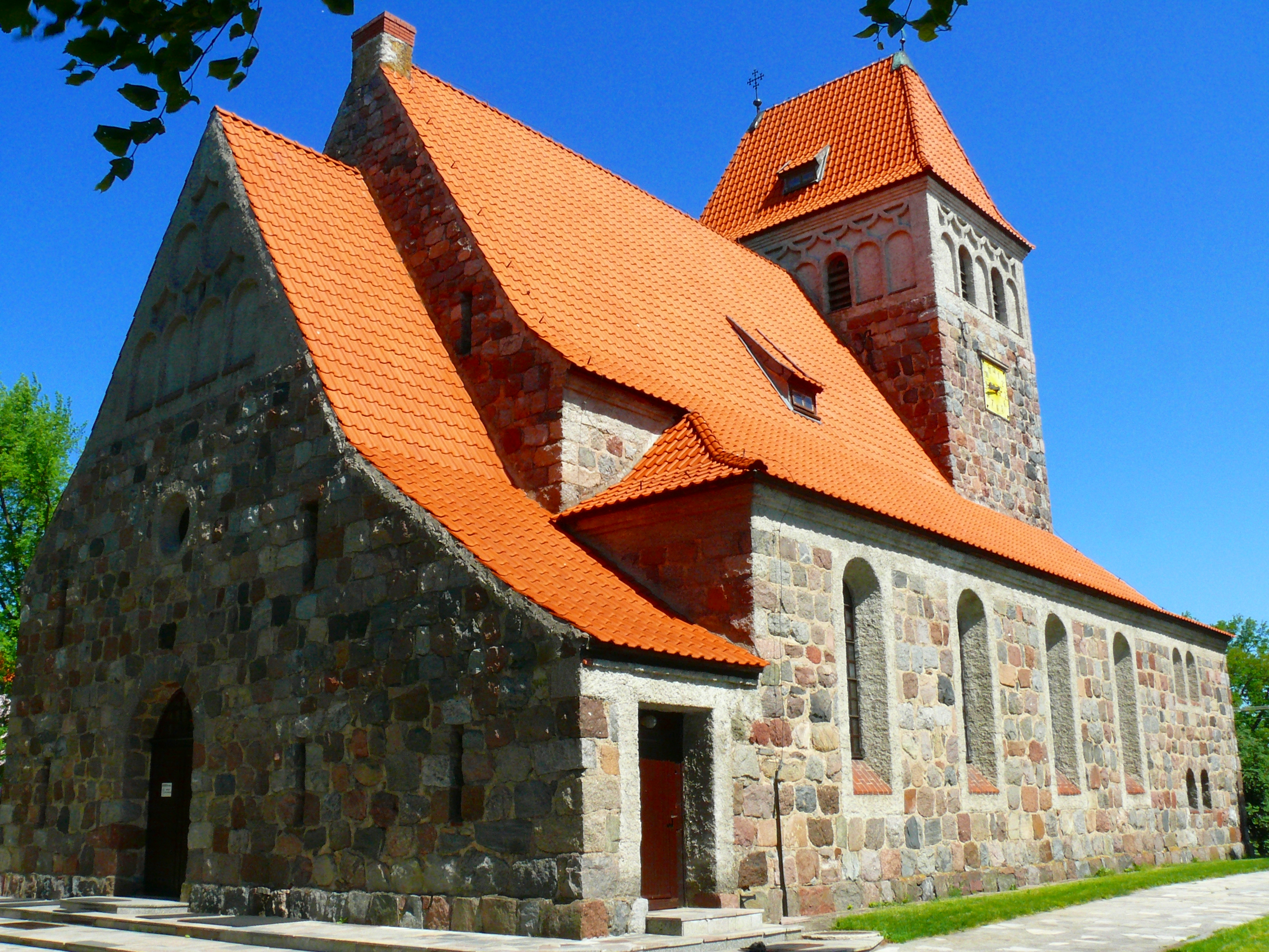 Kalinowo - kościół